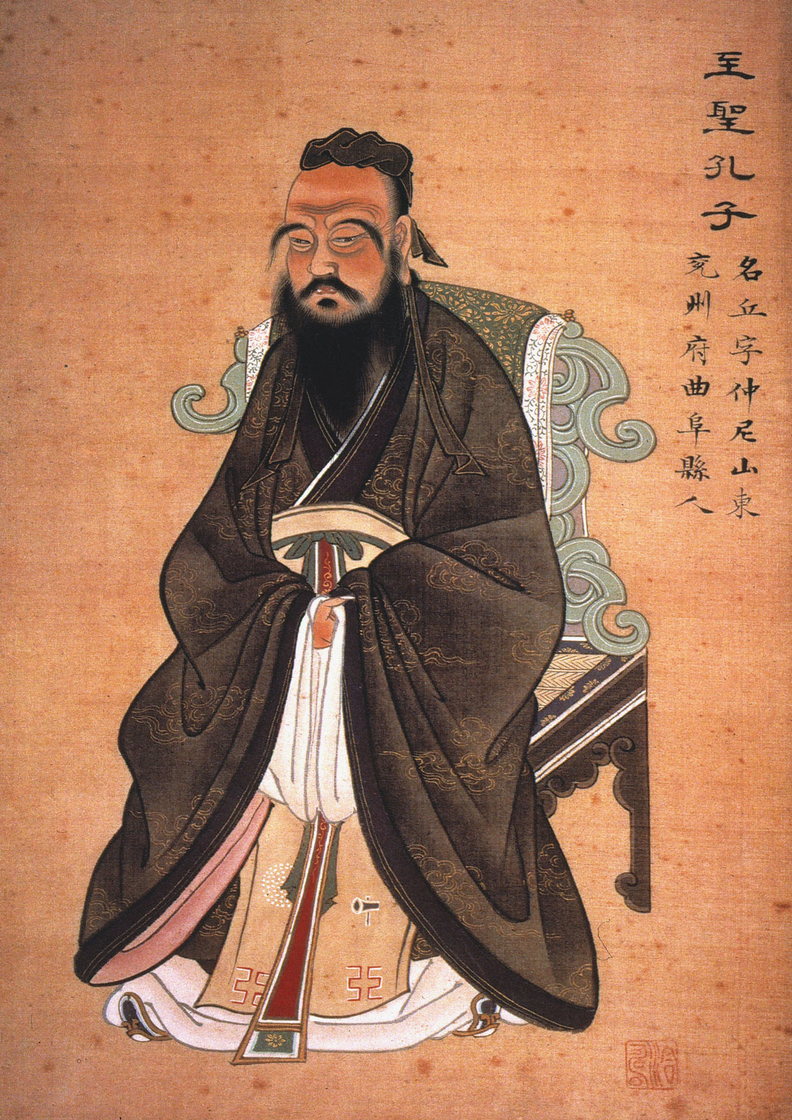 Confucius